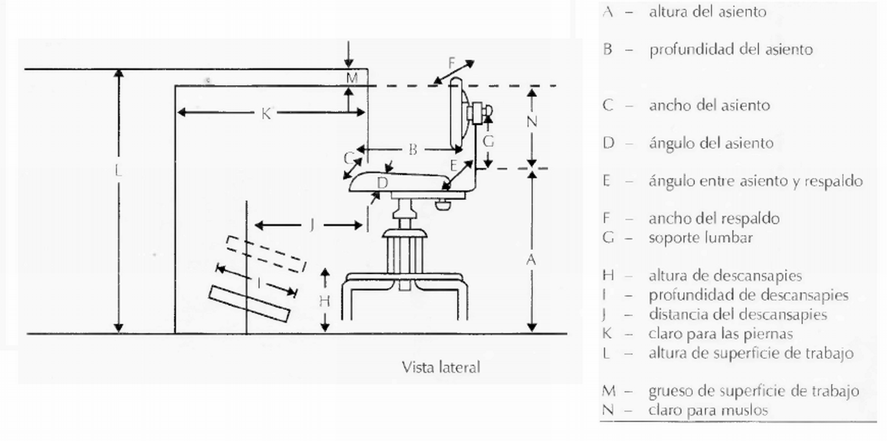 Dimensiones para una silla ajustable para el trabajador